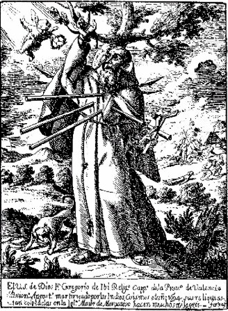 Martirio de Gregorio de Ibi, capuchino.